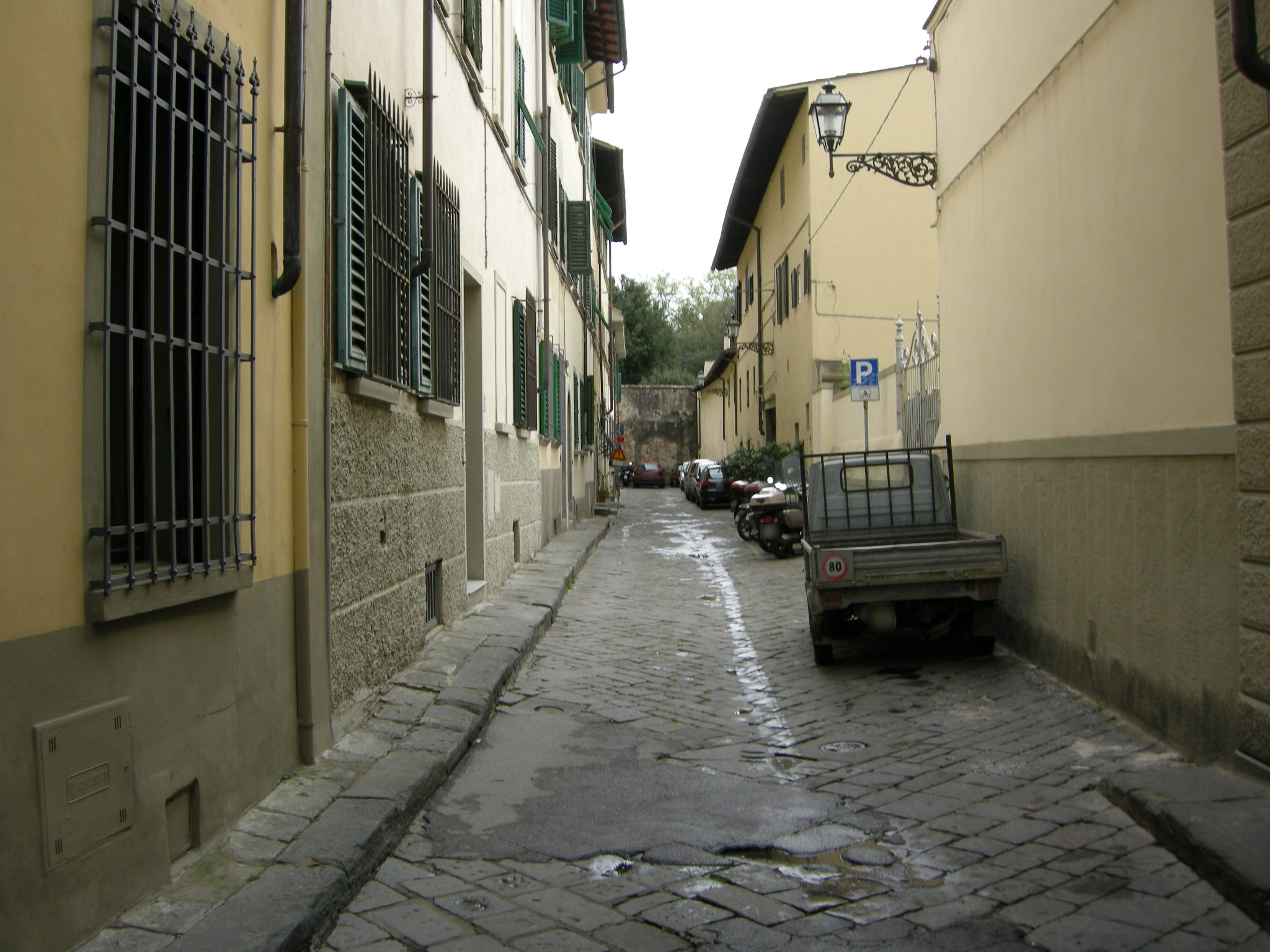 Vicolo del ronco